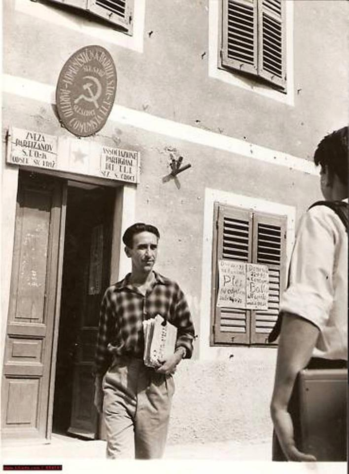 Partito Comunista del TLT, sez. di Santa Croce di Trieste, 1947-1954